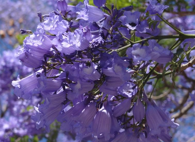 Photos des fleurs du Flamboyant bleu. Jacaranda mimosifolia